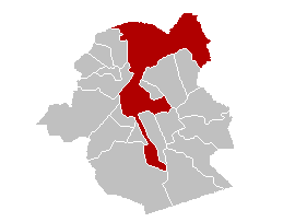 Localisation de Bruxelles-ville parmi les 19 communes de la Région de Bruxelles-Capitale